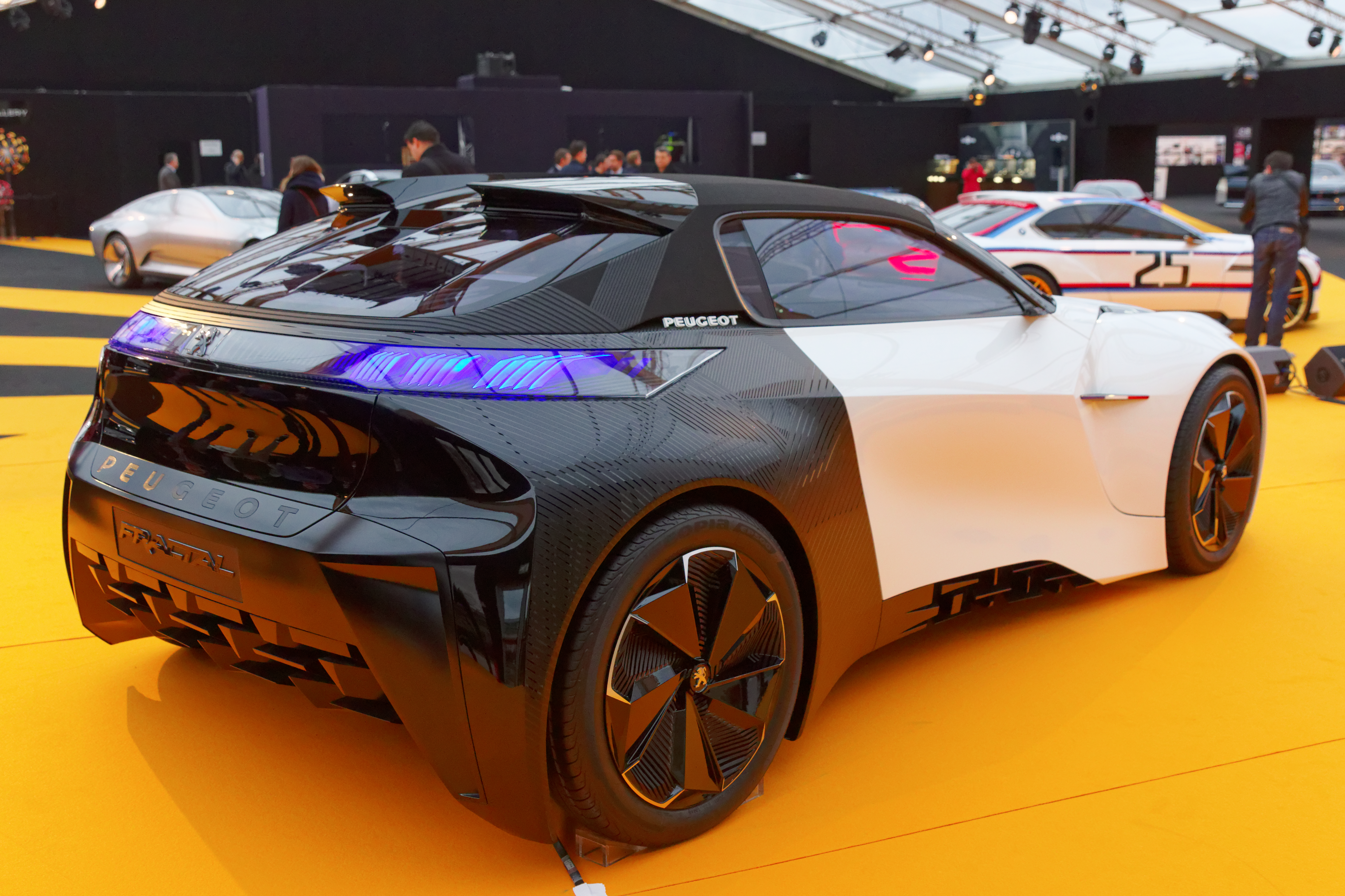 La Peugeot Fractal exposée lors du festival automobile international 2016.